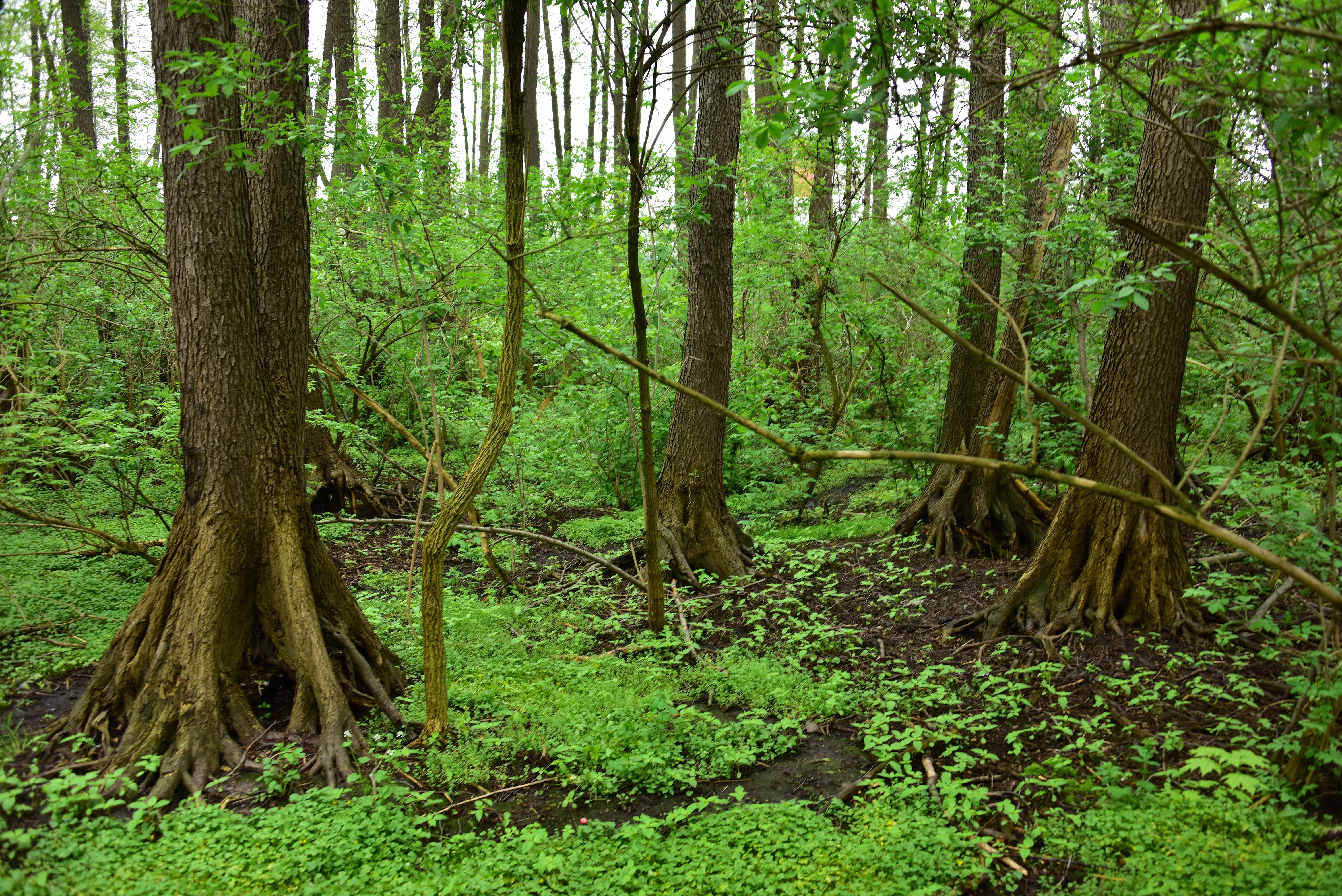 Zespół przyrodniczo-krajobrazowy Olszyna (park Olszyna) w Warszawie